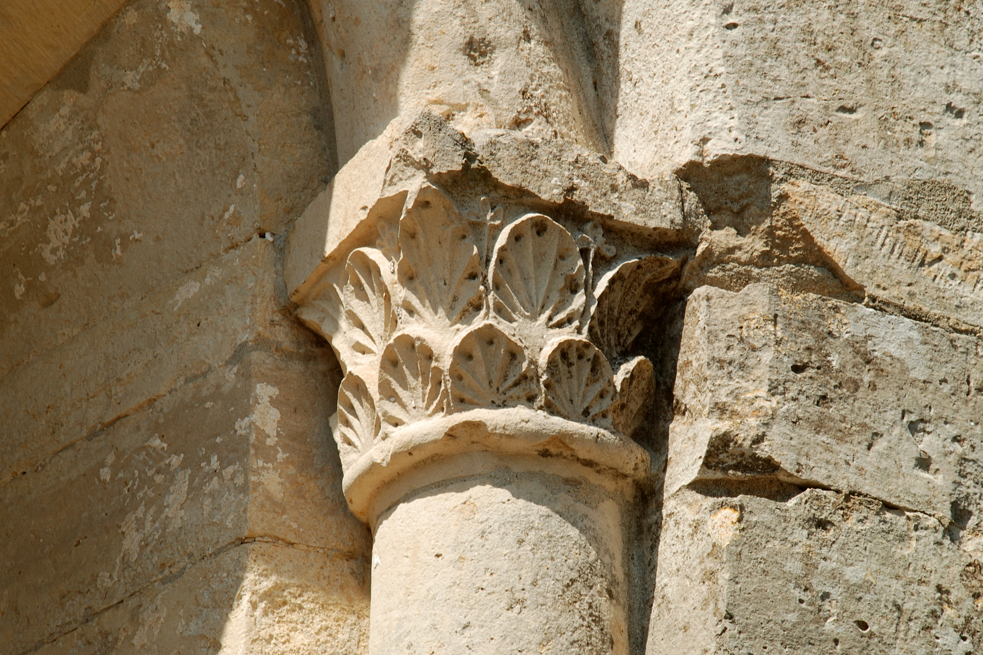 France - Hérault - Église Saint-Michel de Guzargues